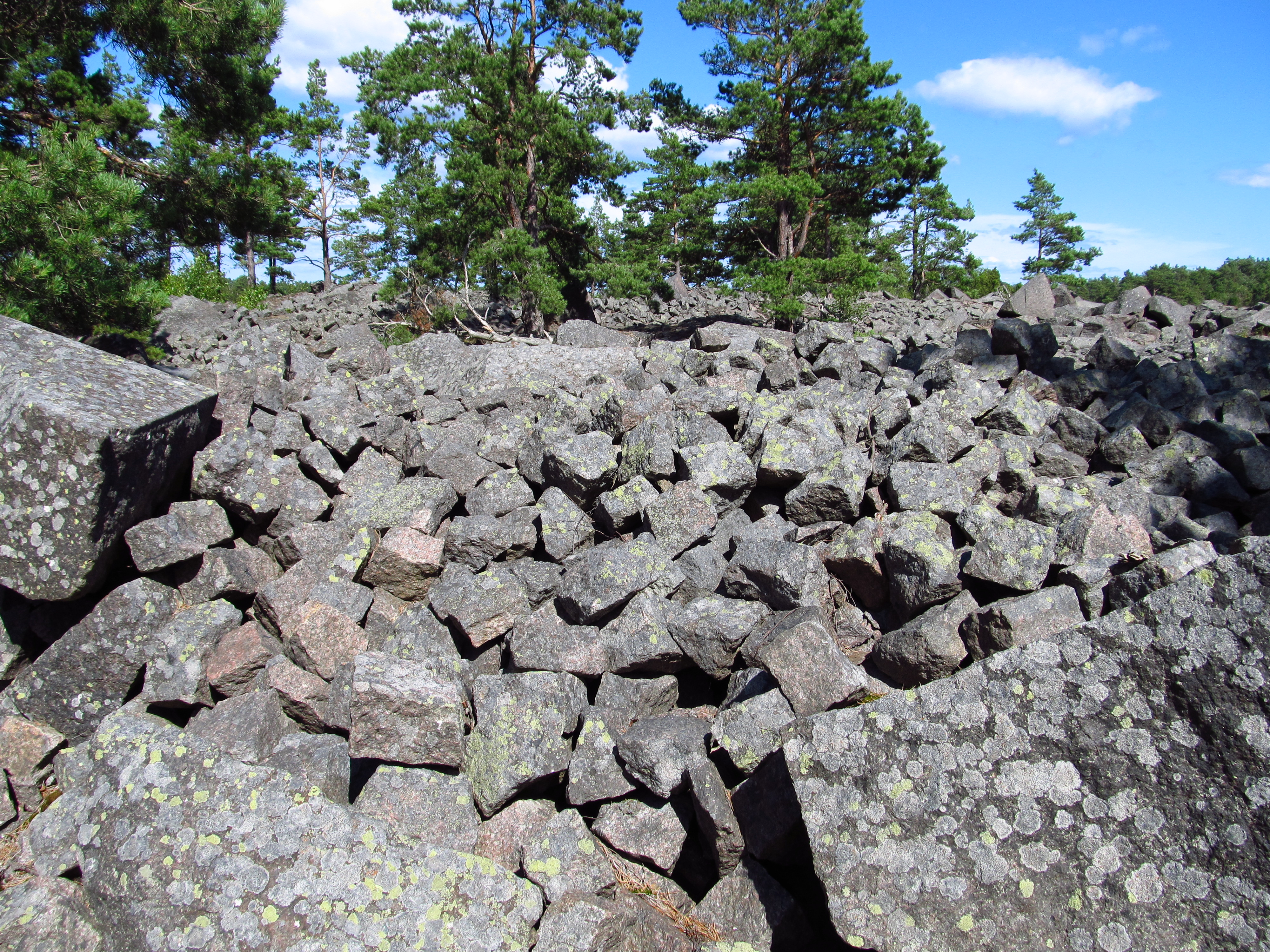 Vånevik stenhuggeri, Oskarshamns kommun.